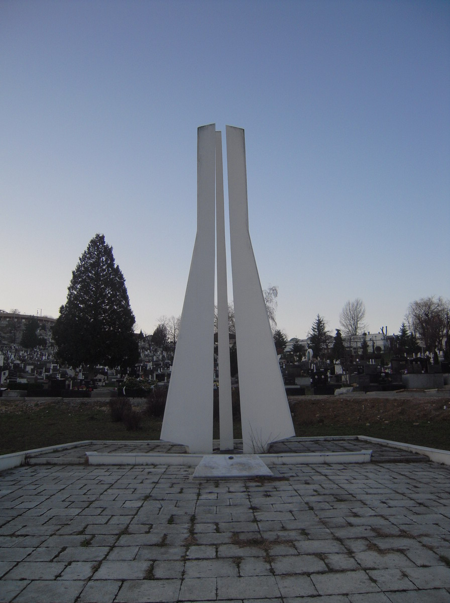 Споменик_на_Партизанском_гробљу_у_Бањалуци